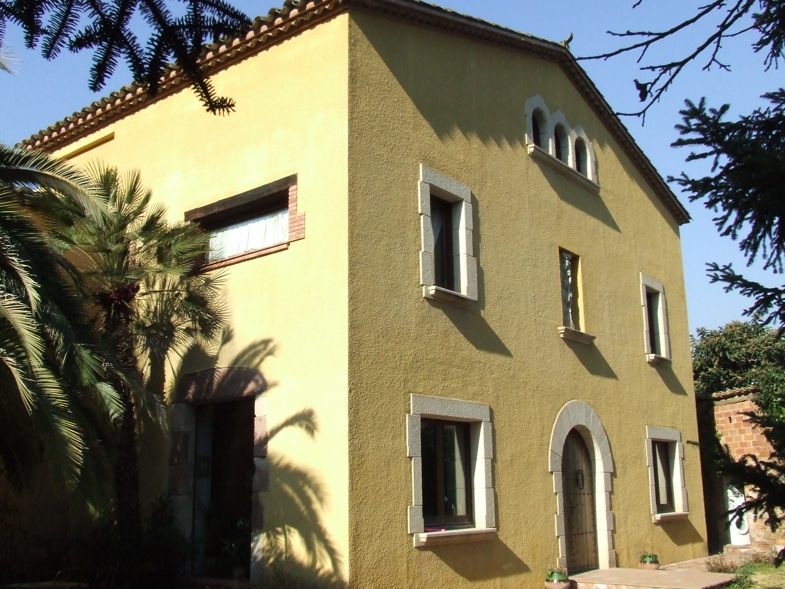 Can Taberner (Bigues, Bigues i Riells, Vallès Oriental)